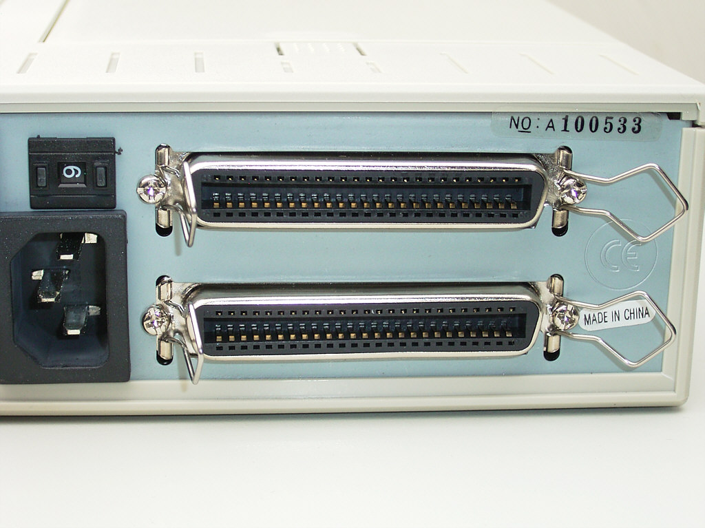 Anschlüsse an einem externen SCSI-Gerät. 50-polige Buchsen ("Centronics"-Typ) für 8 Bit Busbreite. Links oben der Schalter zur Einstellung der SCSI-ID von 0 bis 7.